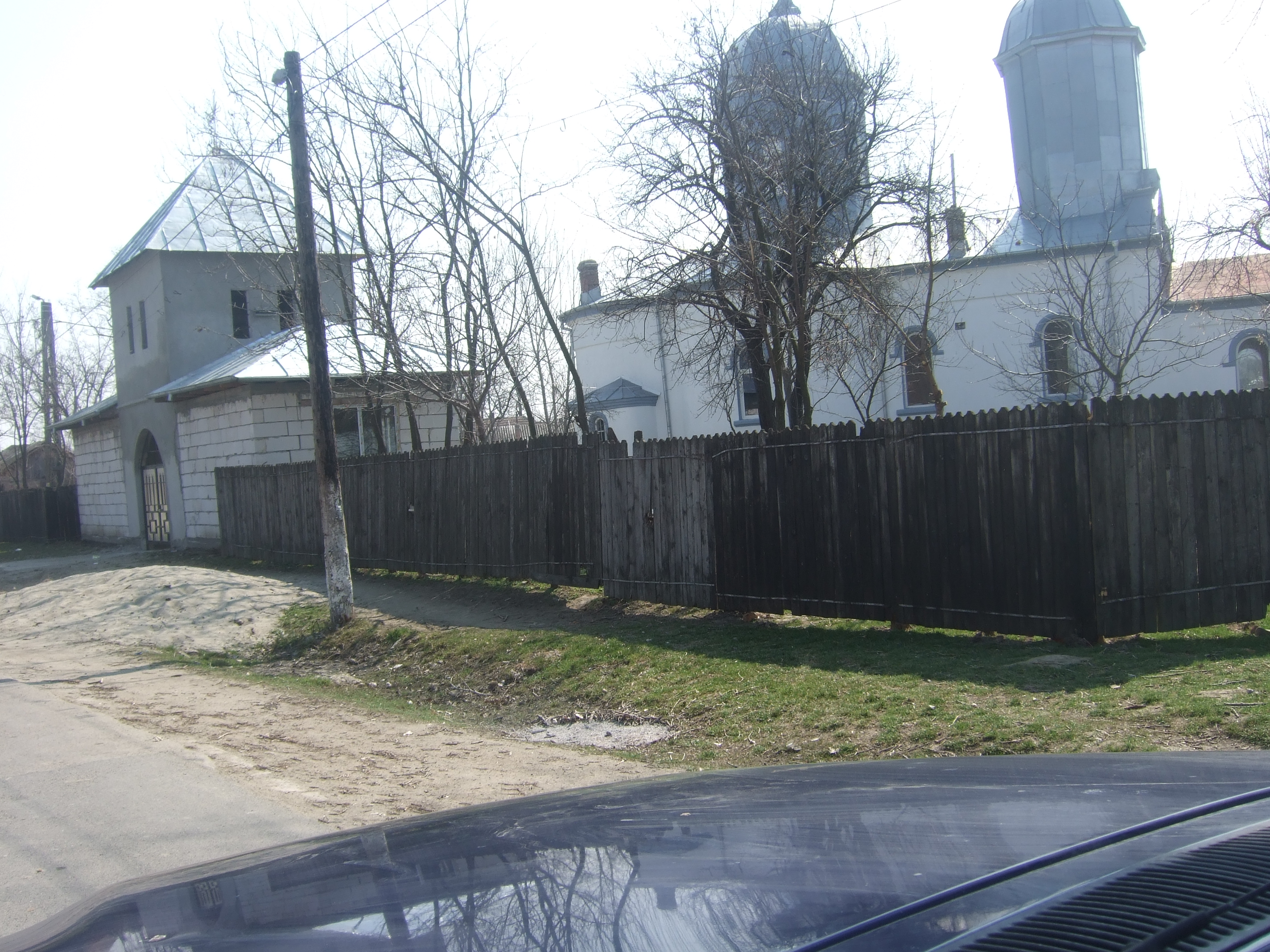 Biserica din Pelinu-Condeesti (Eliza)1851